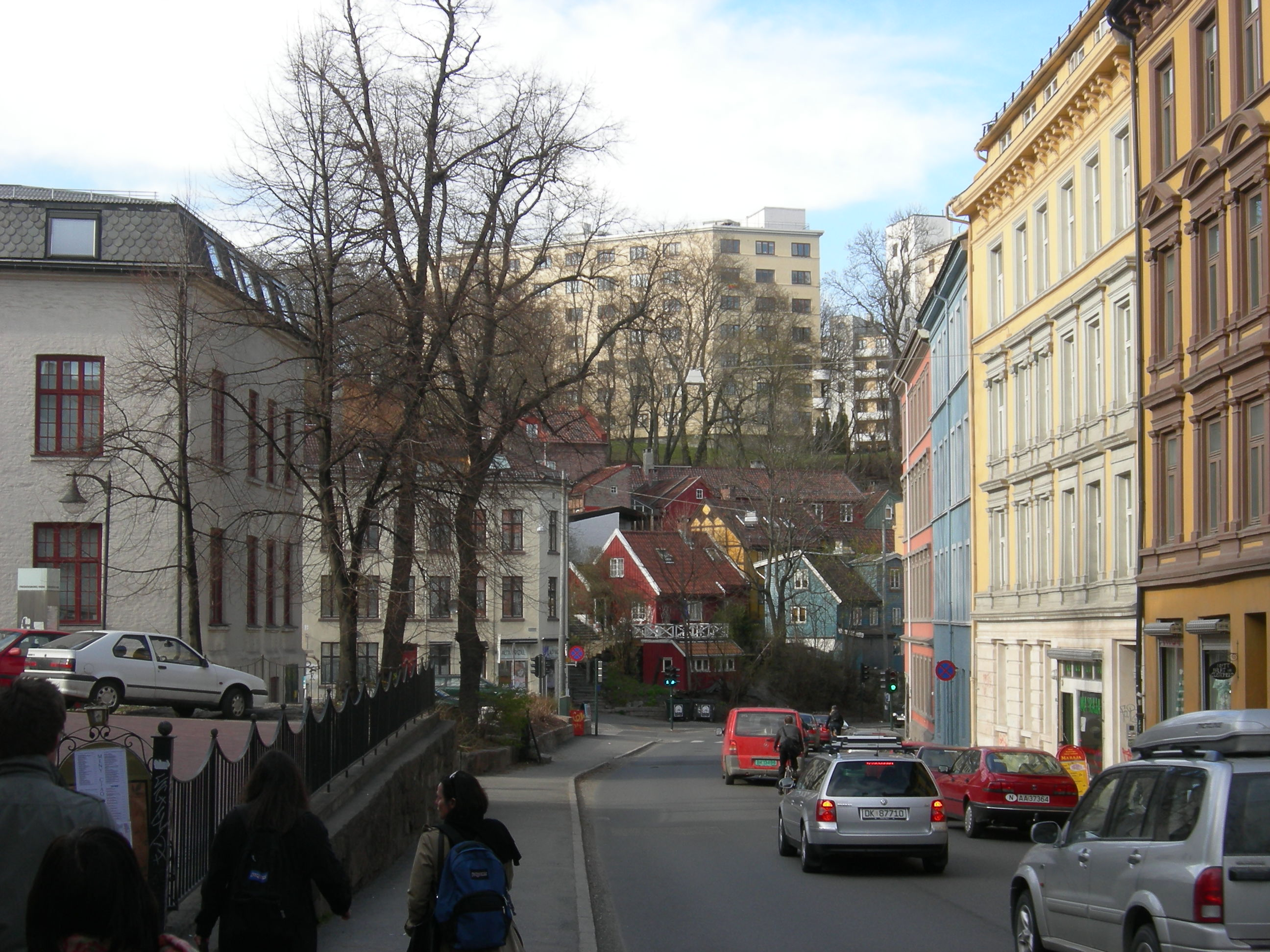 Fredensborgveien mot Damstredet, Oslo, Norway